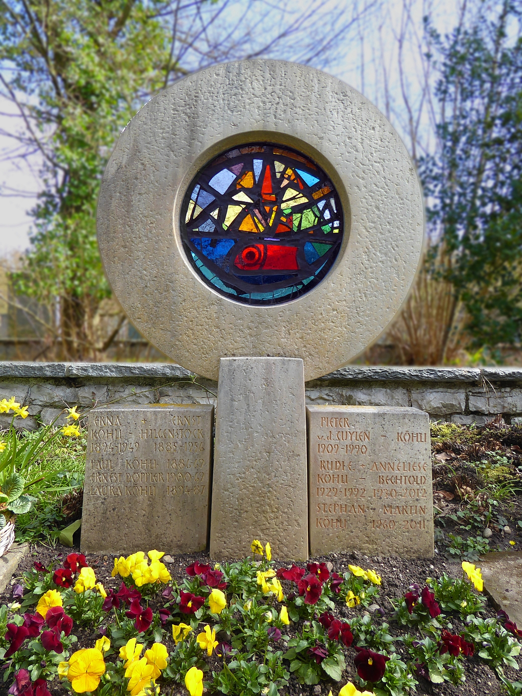 Pieter van de Cuylen-Köhli (1909–1990) Kunstmaler, Zeichner, Plastiker, Religiöse Kunst, Familiengrab auf dem Friedhof Hörnli, Riehen, Basel-Stadt